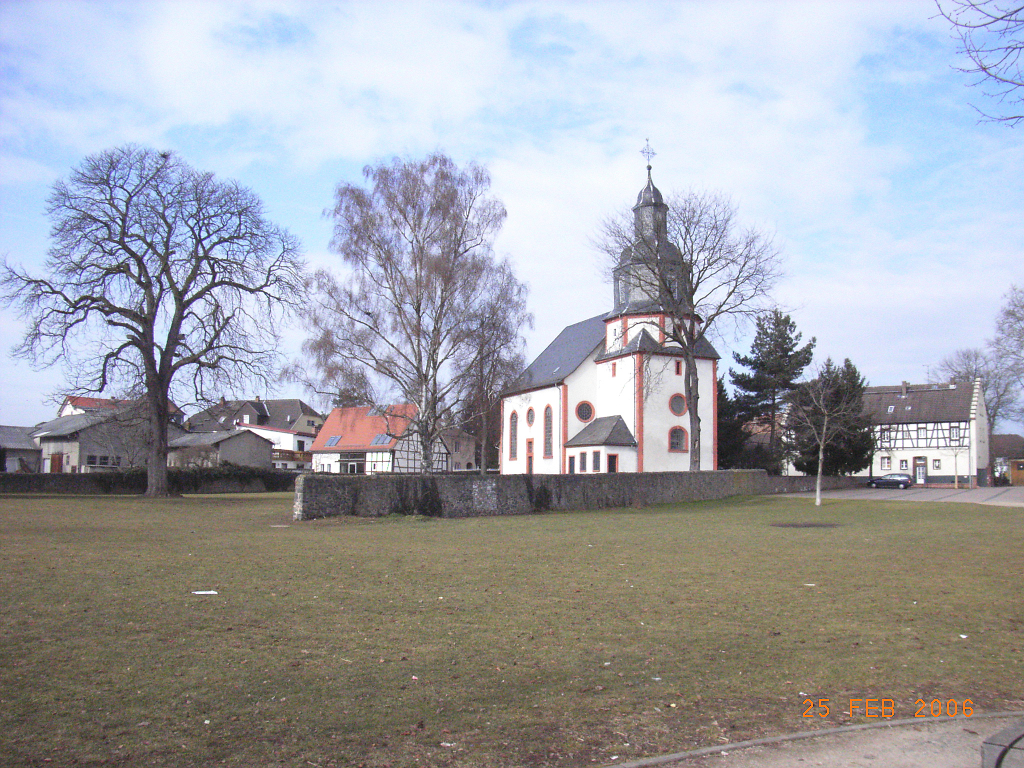 evangelische Kirche in Gundernhausen (zu Gemeinde Rossdorf/Hessen/Kreis Darmstadt-Dieburg), von Südosten